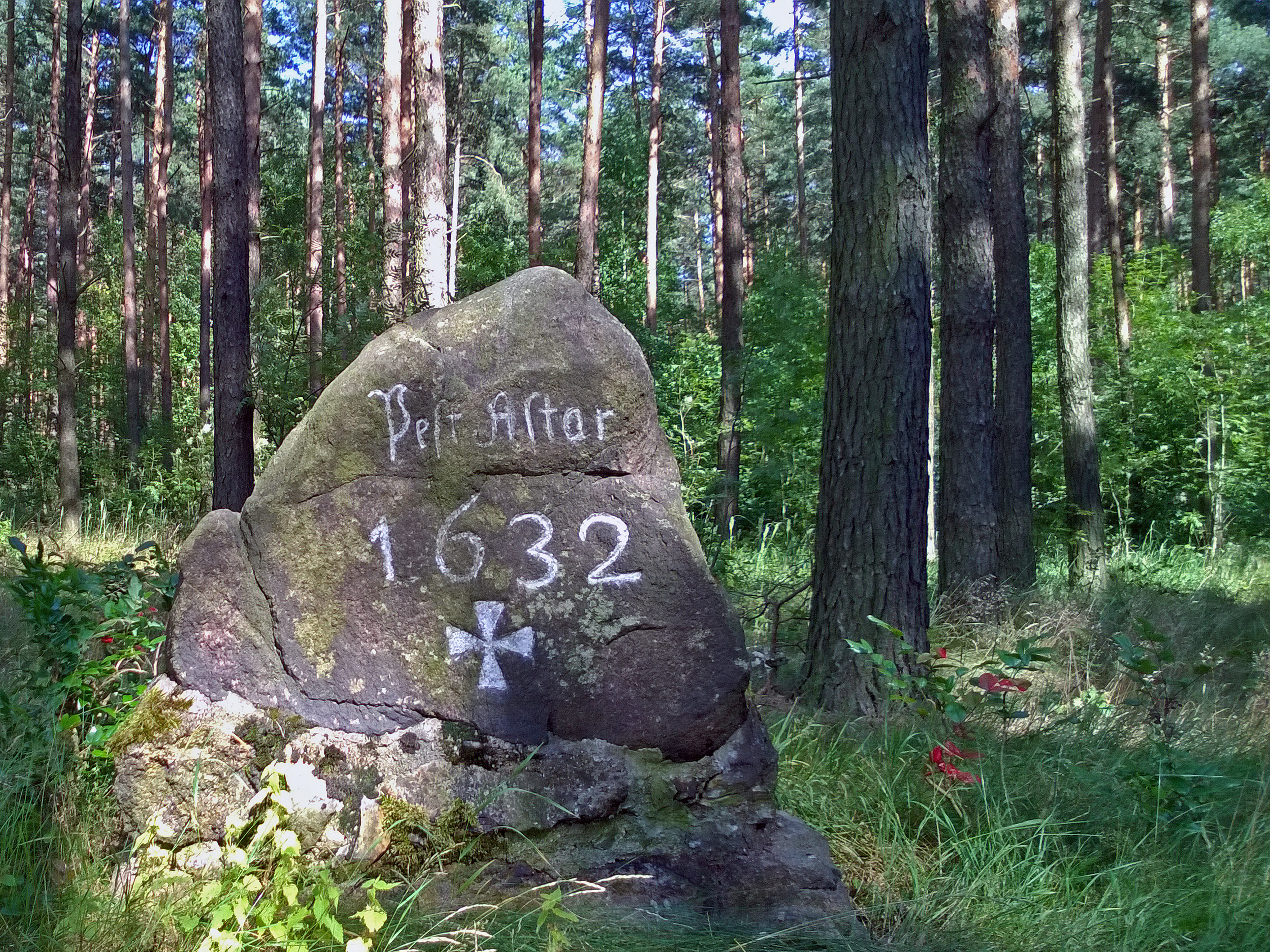 Pestaltar südlich von Petershain